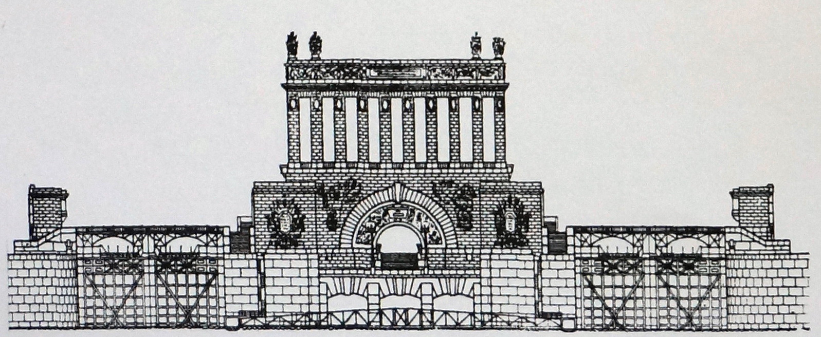 Декоративная колоннада на нижней голове нижнего шлюза. Ранний проект Жигулёвского гидроузла